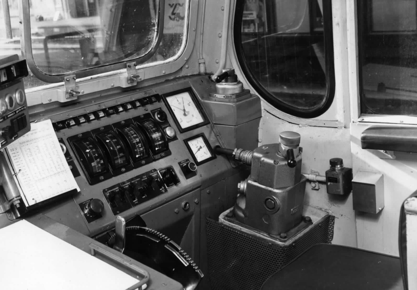 Afbeelding van de cabine van een electrische locomotief uit de serie 1500 van de N.S..